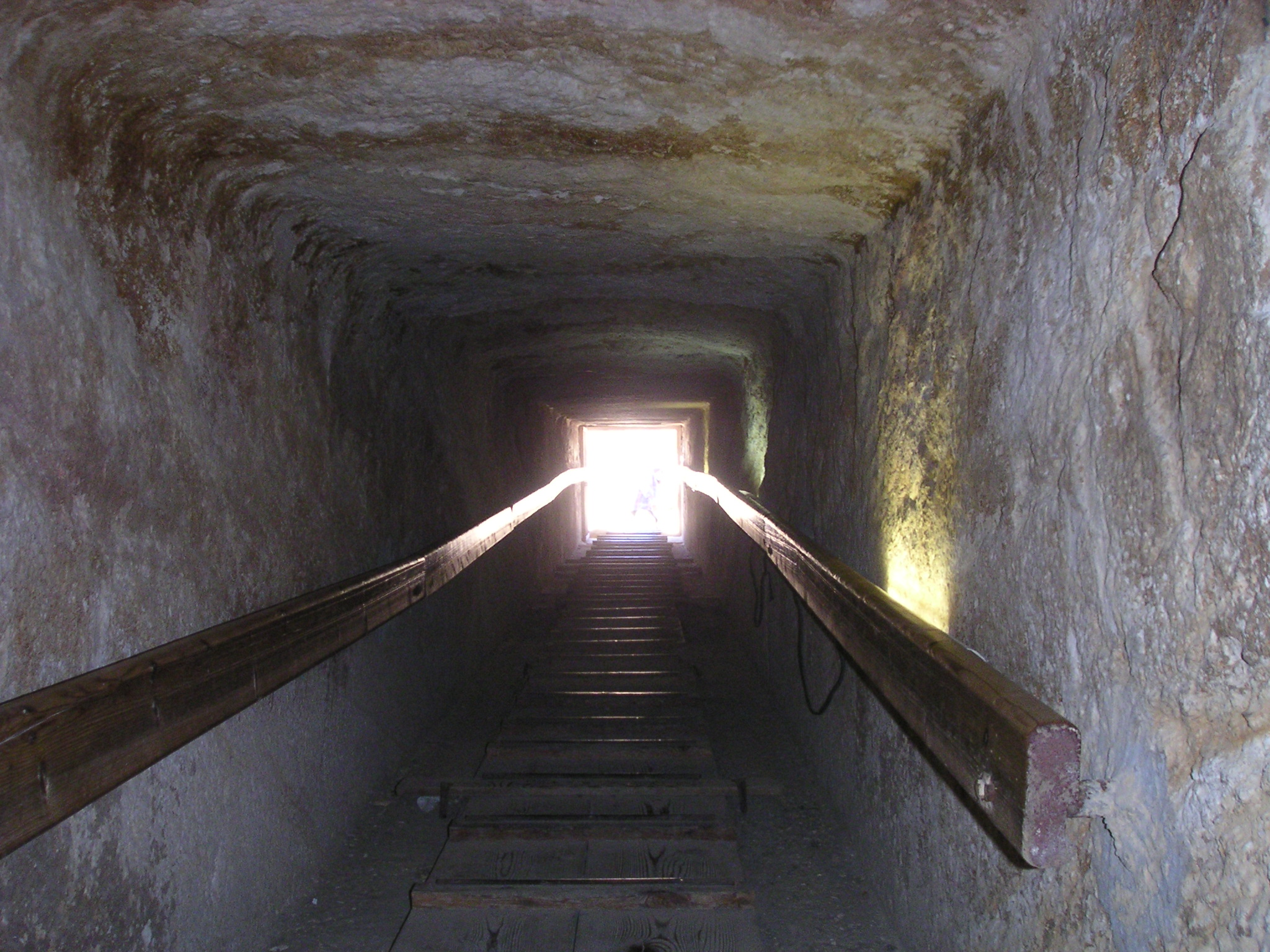 Vue de la descenderie de la pyramide de la reine Henoutsen, épouse royale de Khéops - IVe dynastie égyptienne - Gizeh - novembre 2004